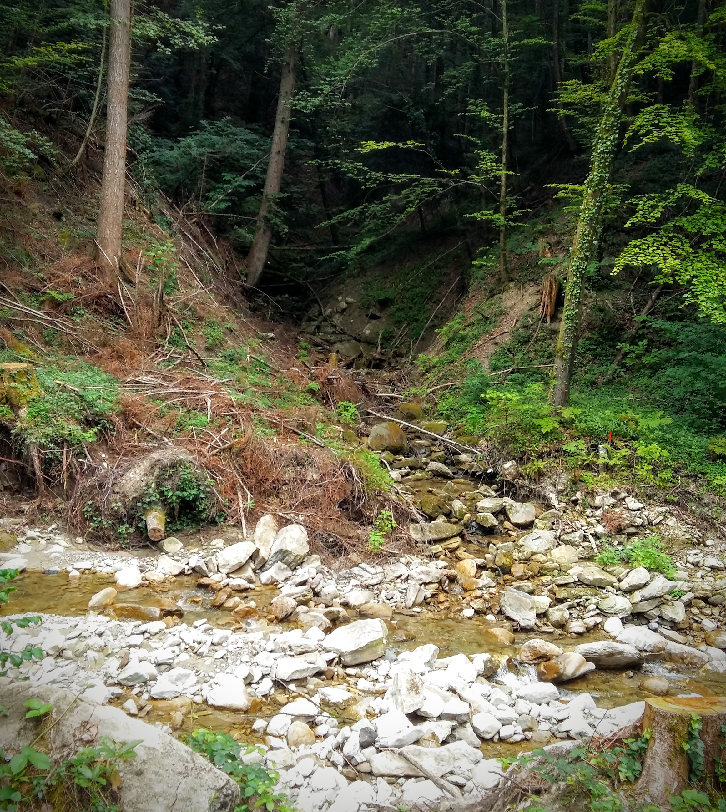 Der Littenbach vor dem Zaatobel, Zusammenfluss von Fallbach (von links) und Sulzbächli (von oben)